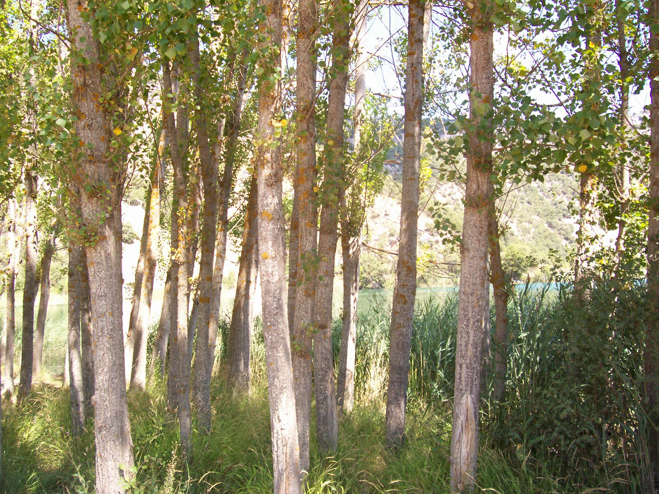 Junto a la orilla crecen alamos y vegetacion de ribera. Comarca de Beteta, norte de la Serranía de Cuenca This is a photography of a Special Area of Conservation in Spain with the ID: ES4230014. Natura2000 entry, EEA entry